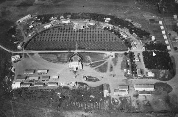 מבני הפרסה באיילת השחר - מבט אווירי - 1939